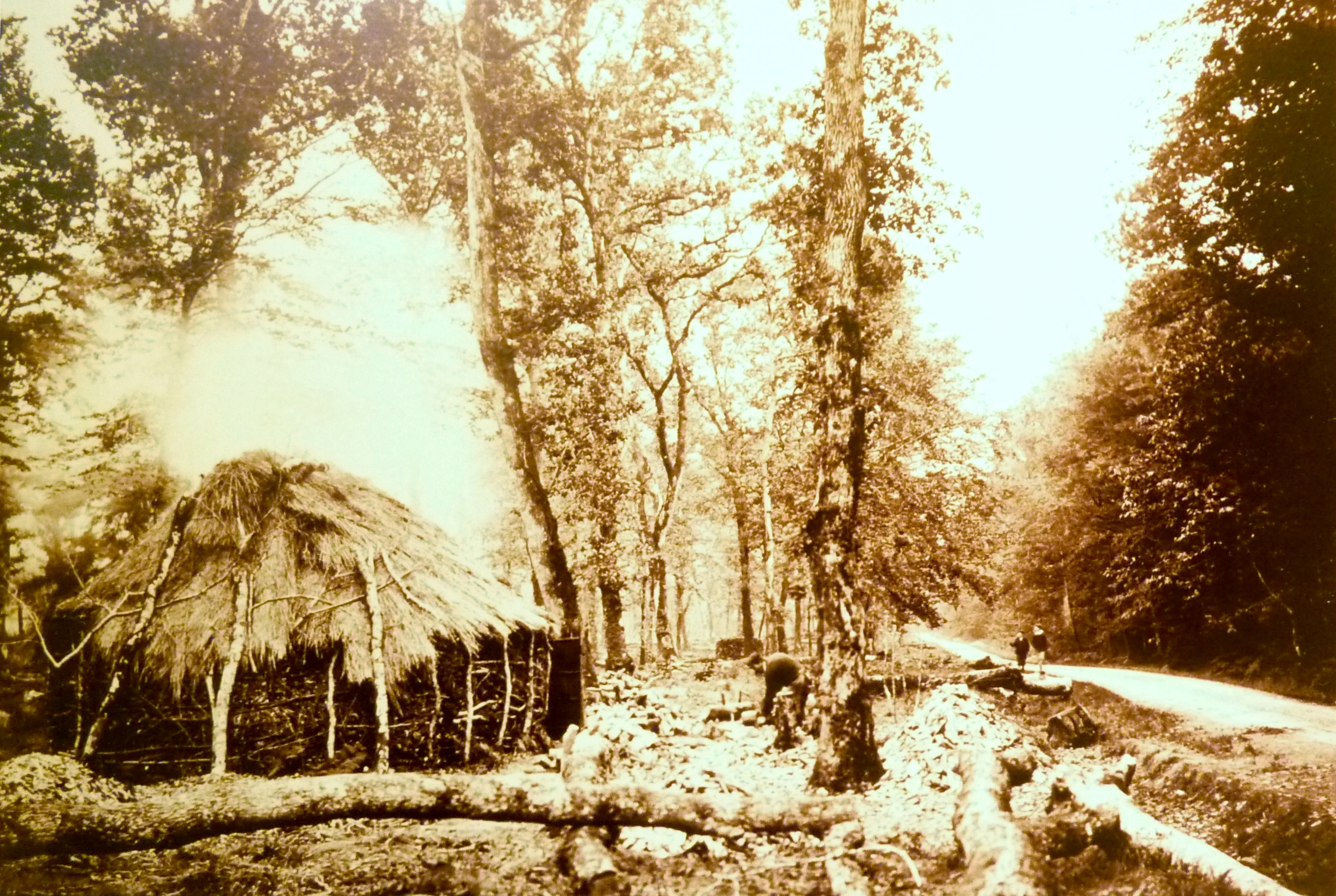 Hutte de charbonniers en forêt de Clohars-Carnoët (photographie anonyme, 1910, musée de Bretagne).